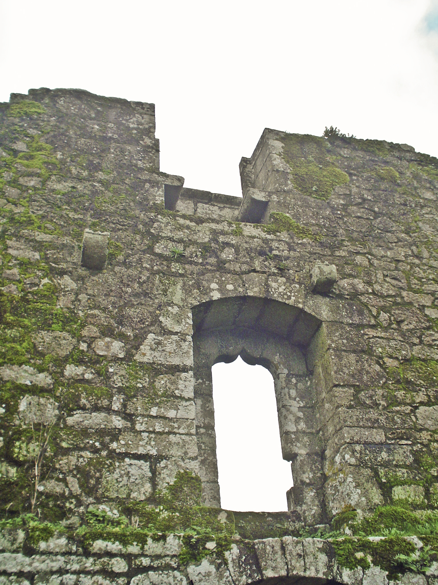 Torres de Altamira. Parede do Palacio